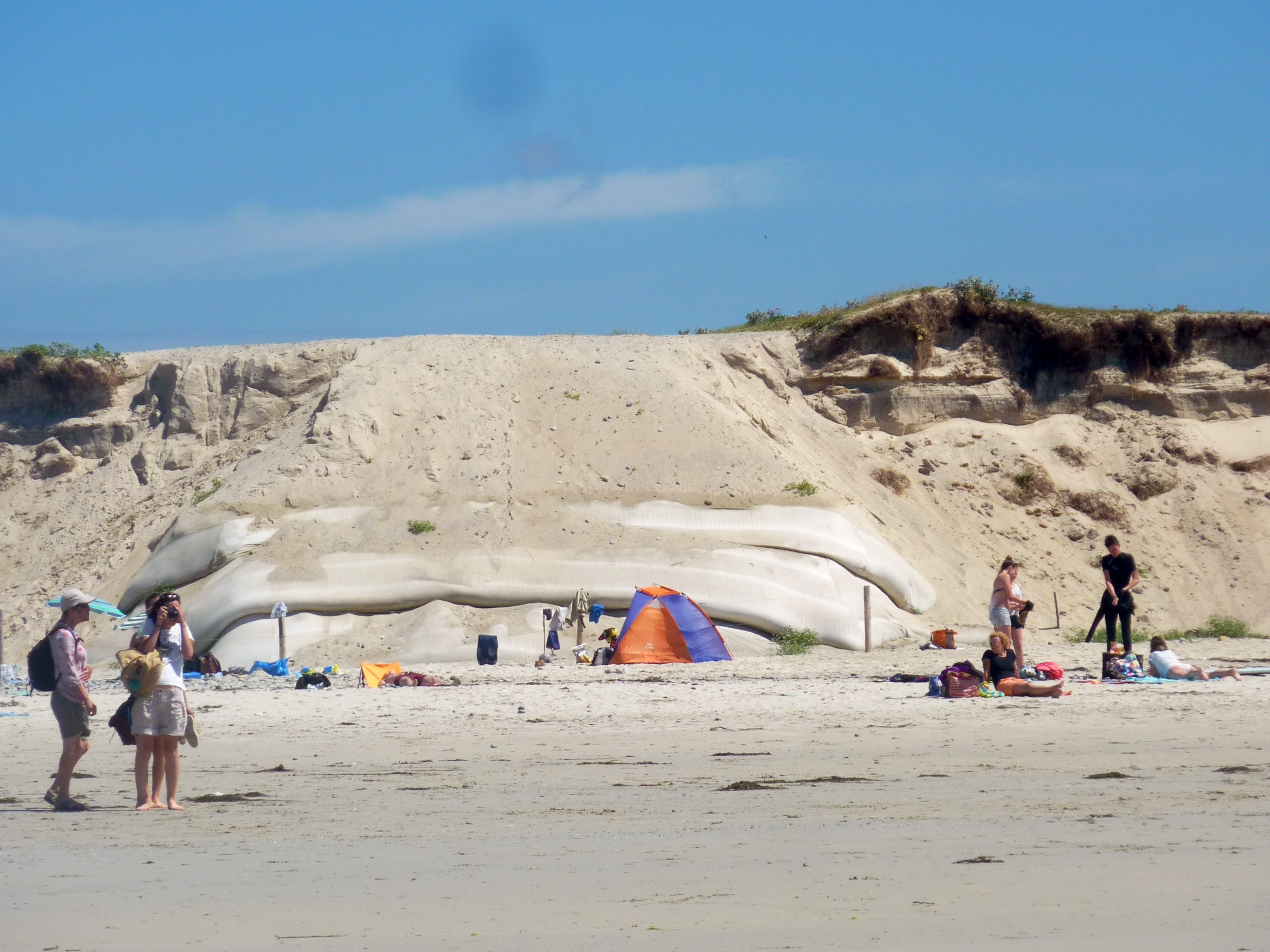 Tréguennec (Finistère, France) : les dunes littorales exposées à l'érosion ; partie récemment remblayée par des apports de sable et tentative de protection des dunes dans leur partie basse par des géotextiles